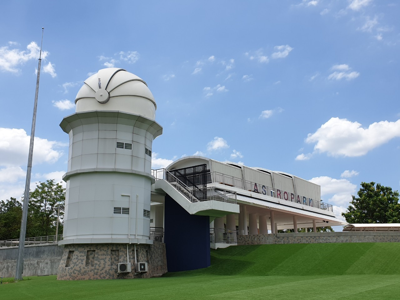 หอดูดาวสำหรับให้บริการประชาชน ณ อุทยานดาราศาสตร์สิรินธร จ. เชียงใหม่